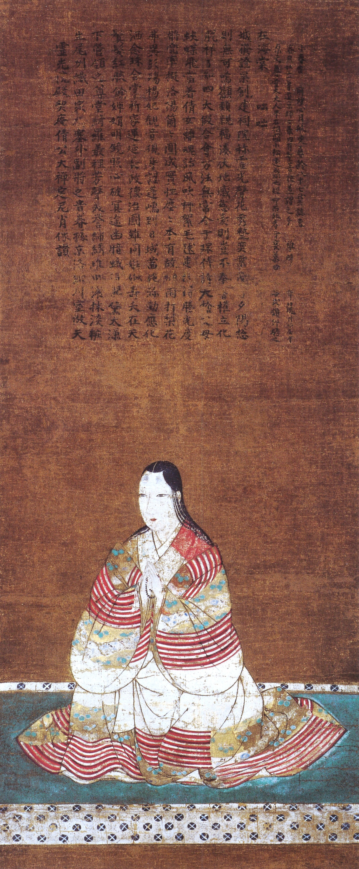 細川昭元夫人・お犬の方 (? - 1582) の肖像画。月航宗津・賛。